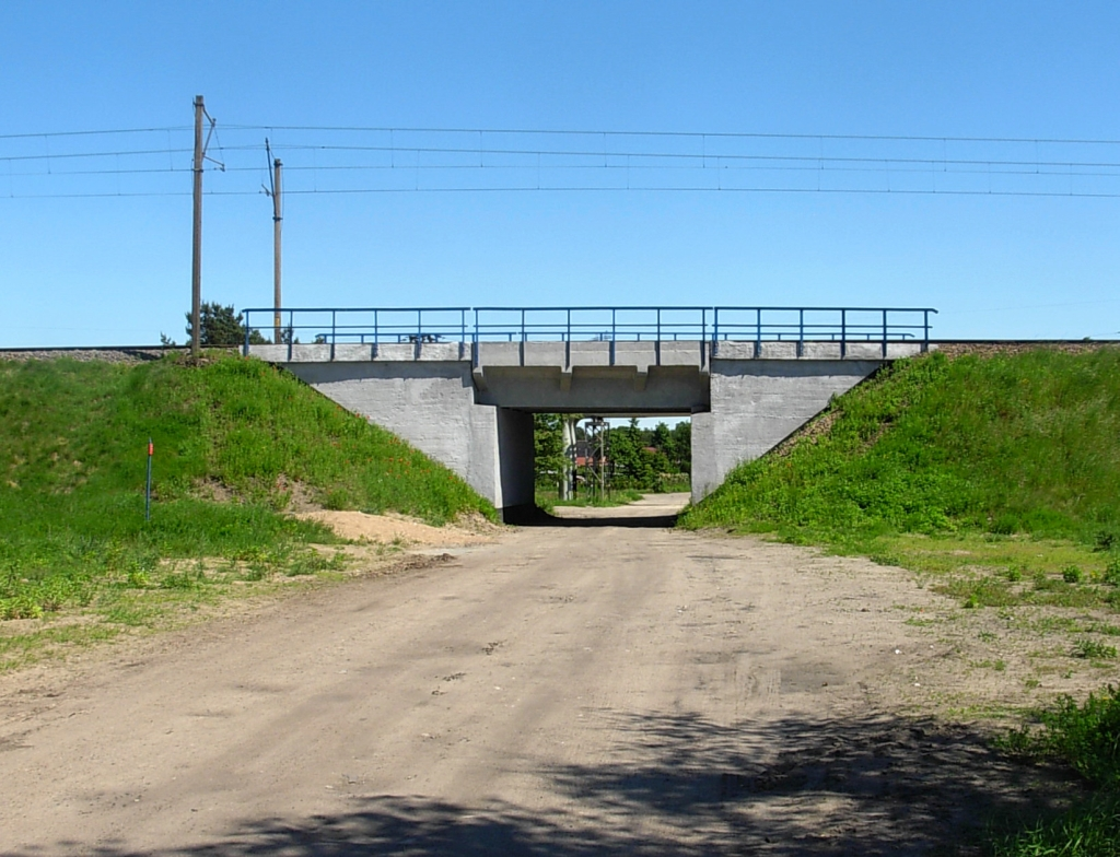 Wiadukt magistrali węglowej, linii nr 201 nad ul. Kapliczną w Bydgoszczy